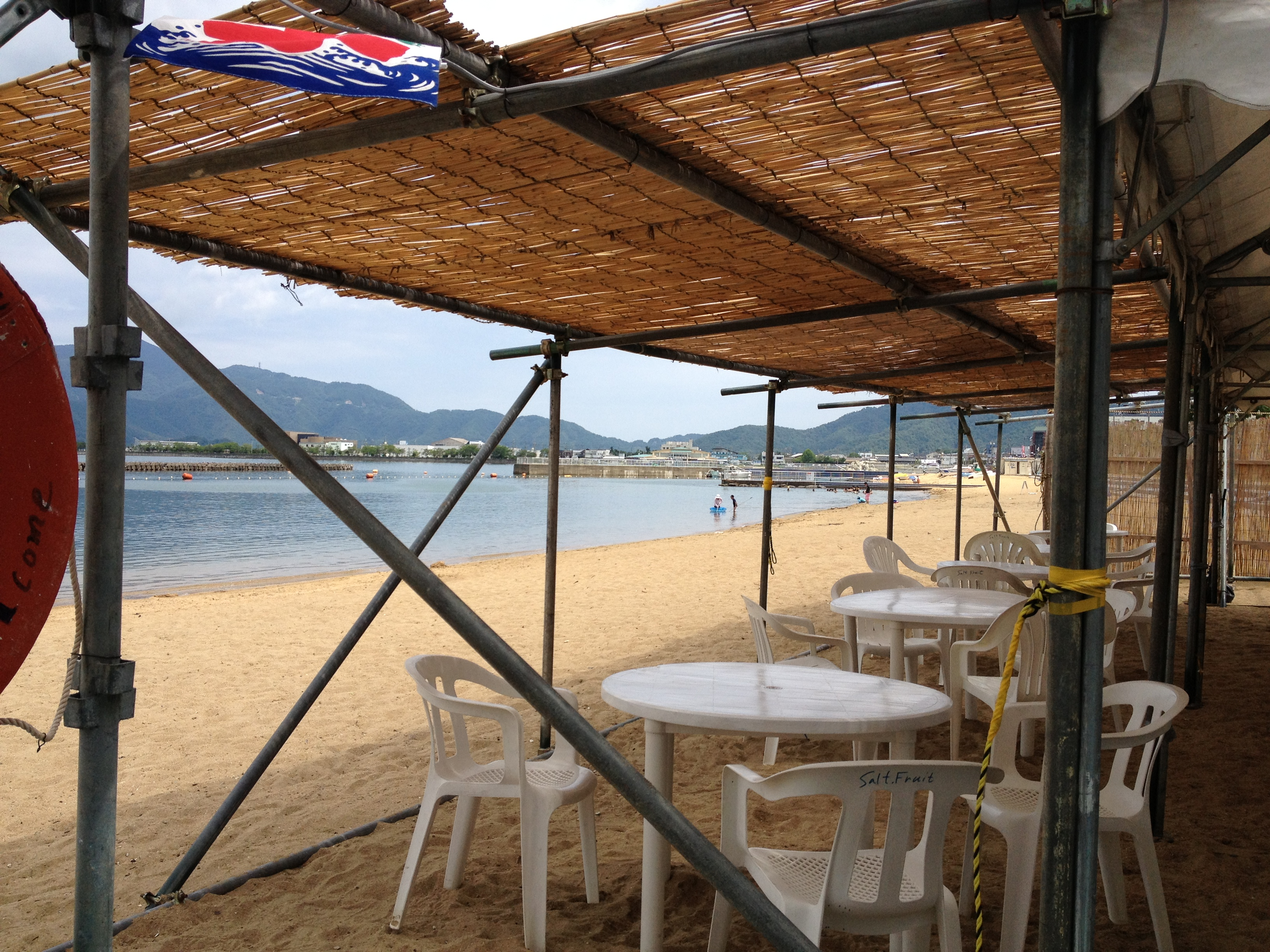 福井県小浜の浜茶屋